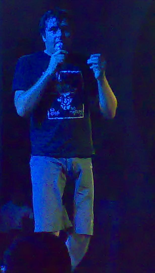 Mark „Barney“ Greenway.